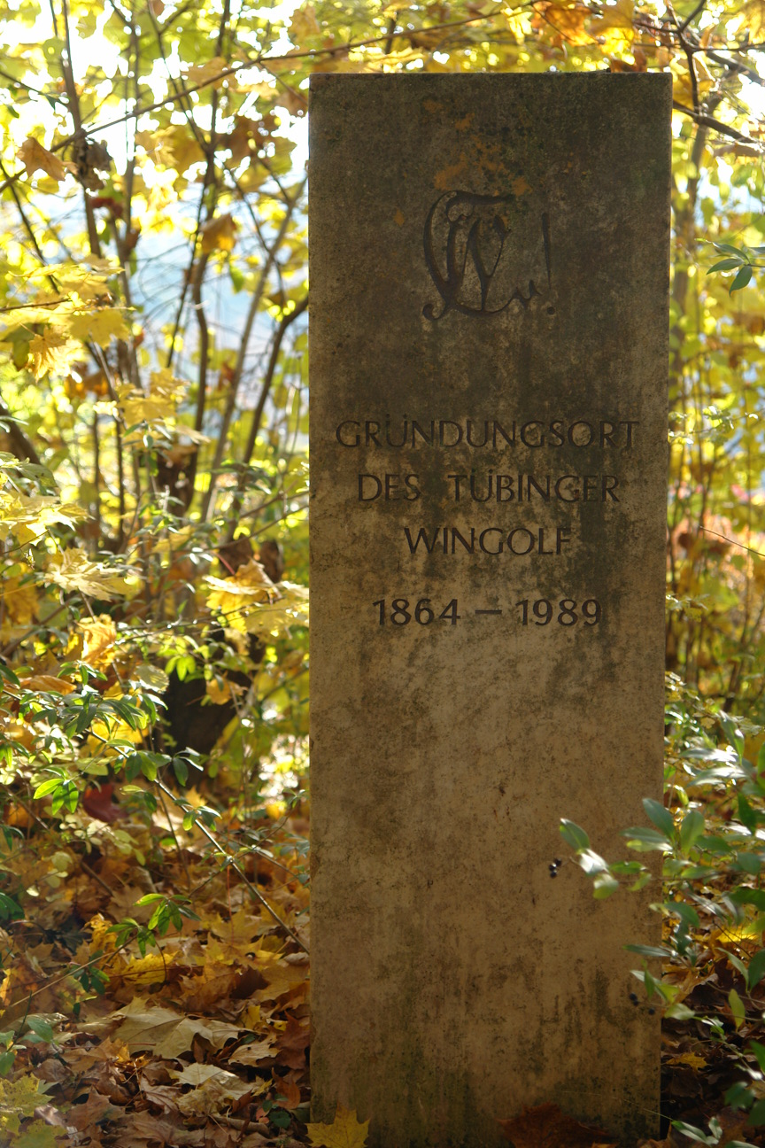 Tübingen. Kalleehöhe auf dem Galgenberg in mit Wingolfstein